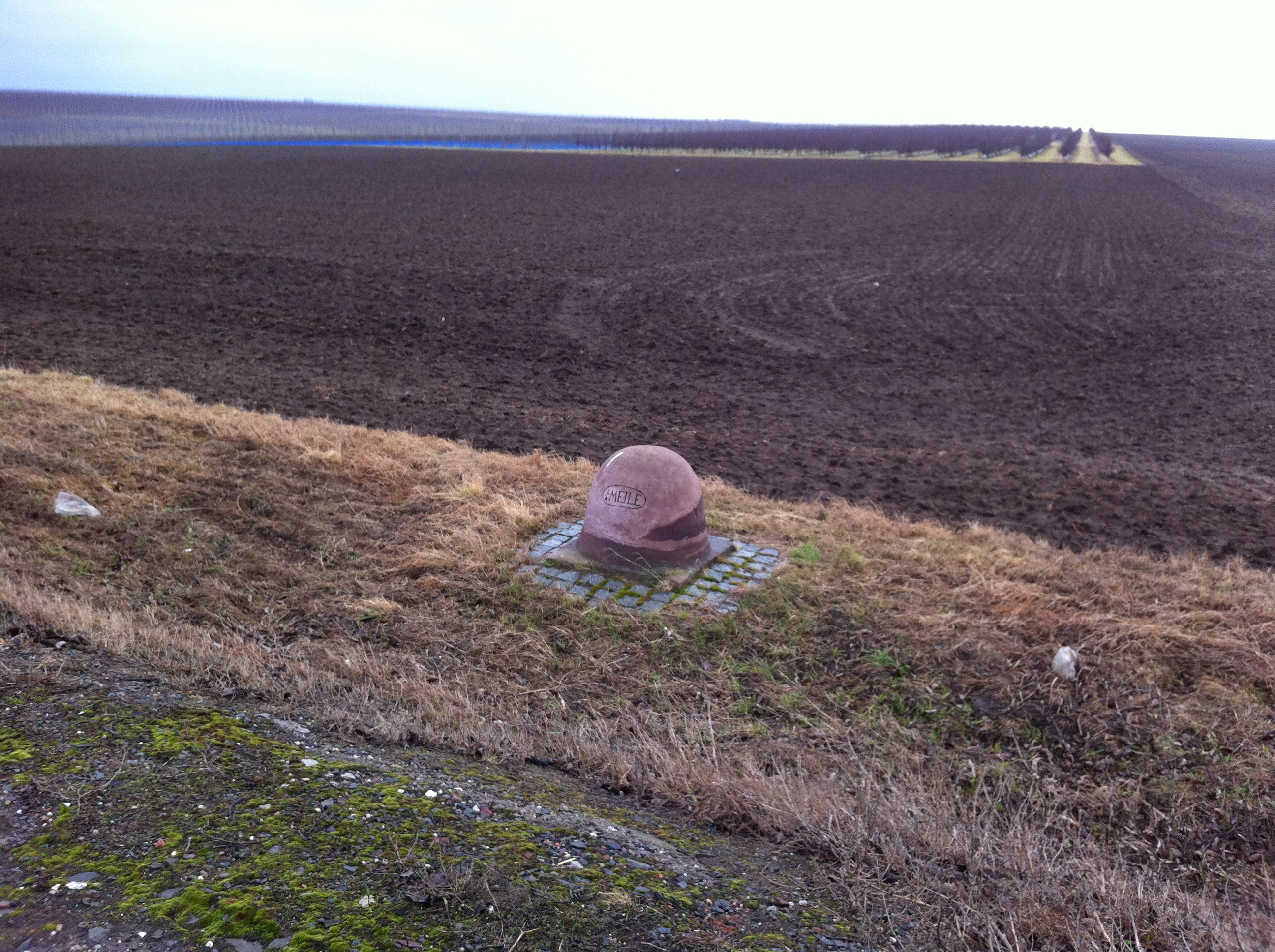 Preußischer Viertelmeilenstein an der Bundesstraße 80 bei Lüttchendorf. Früher verlief hier die Kunststraße von Langenbogen über Eisleben und Sangerghausen nach Nordhausen.